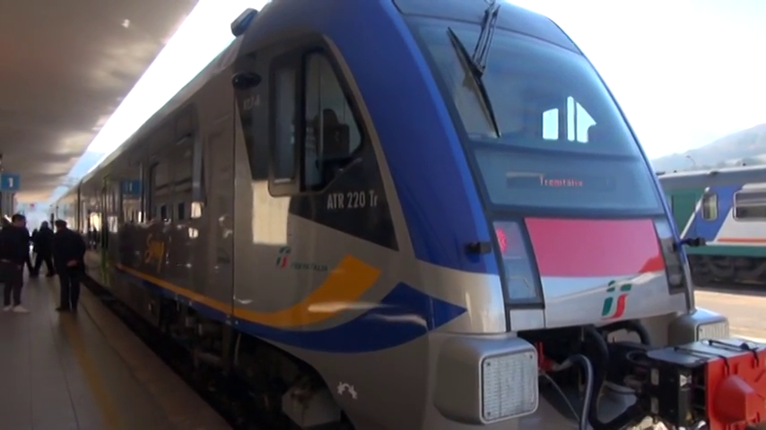 Cerimonia di consegna di tre treni "Swing" dedicati alla linea L'Aquila-Sulmona - stazione dell'Aquila, 26 gennaio 2016